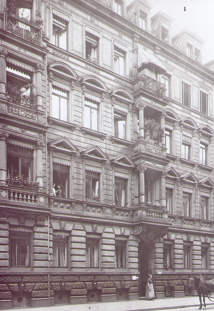 Wohnhaus Georg Kellings in Dresden, Christianstrasse Nr. 30